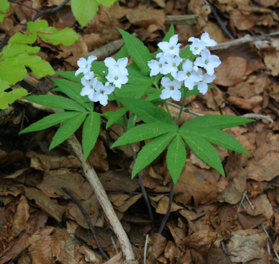 Cardamine heptaphylla, Kreuzblütler (Brassicaceae) - Italien/Italia/Italy: Toscana, Prov. Lucca, Parco Regionale delle Alpi Apuane, E unter Foce Giovo, ca. 1430 m s.m., Buchenwald/bosco di faggio/beech forest